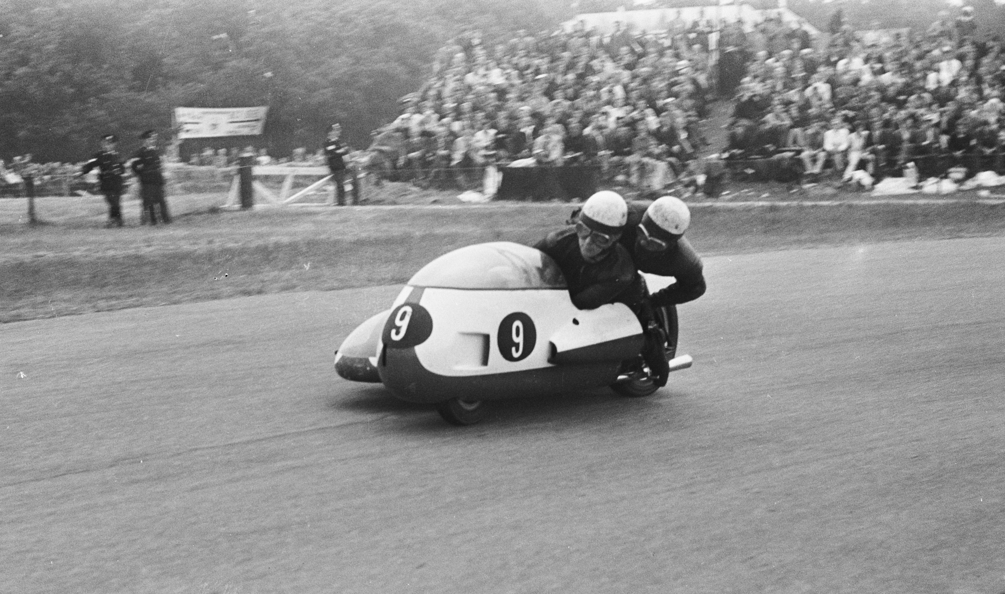 Collectie / Archief : Fotocollectie Anefo Reportage / Serie : TT Assen 1967 Beschrijving : Zijspanrace. BMW Klaus Enders en Ralf Engelhardt (bakkenist), winnaars (Duitsland) Datum : 24 juni 1967 Locatie : Assen, Drenthe Trefwoorden : motorsport Persoonsnaam : Enders, Klaus, Engelhardt, Ralph Fotograaf : Fotograaf Onbekend / Anefo Auteursrechthebbende : Nationaal Archief Materiaalsoort : Negatief (zwart/wit) Nummer archiefinventaris : bekijk toegang 2.24.01.05 Bestanddeelnummer : 920-4324